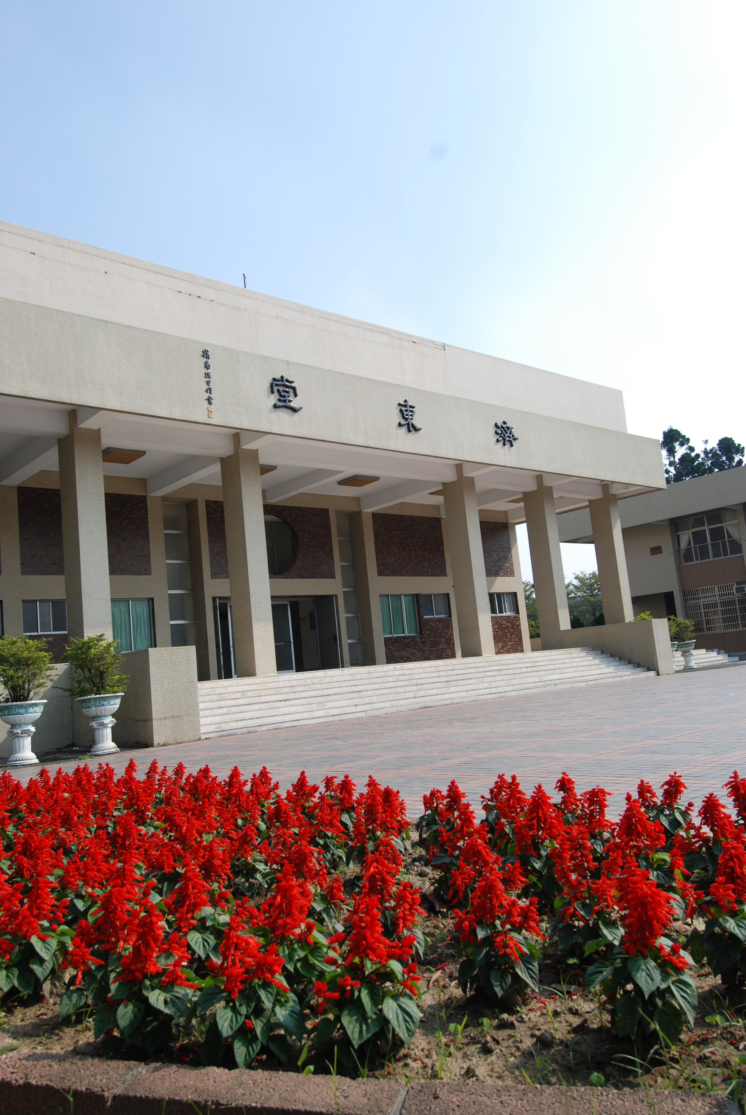 衛道中學濟東堂。